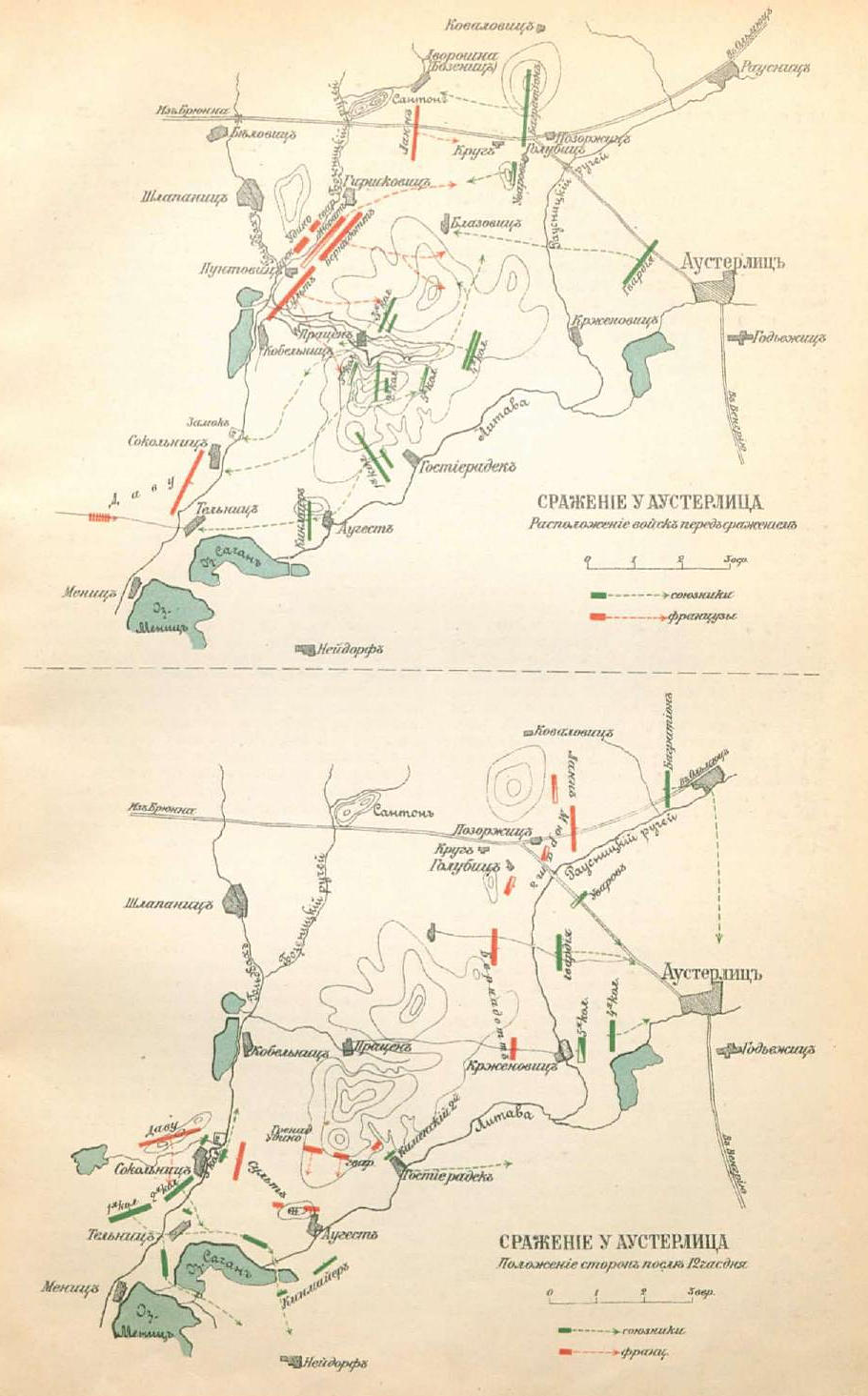 Данное изображение было использовано в статье «Аустерлиц» опубликованной в третьем томе «Военной энциклопедии», который был издан книгоиздательским товариществом Ивана Дмитриевича Сытина в 1911 году в столице Российской империи городе Санкт-Петербурге.